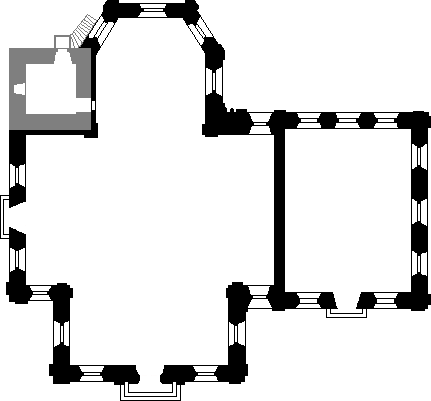 Grundriss des 1740 von Balthasar Neumann gefertigten 1. Bauplans der Laurentiuskirche zu Dirmstein